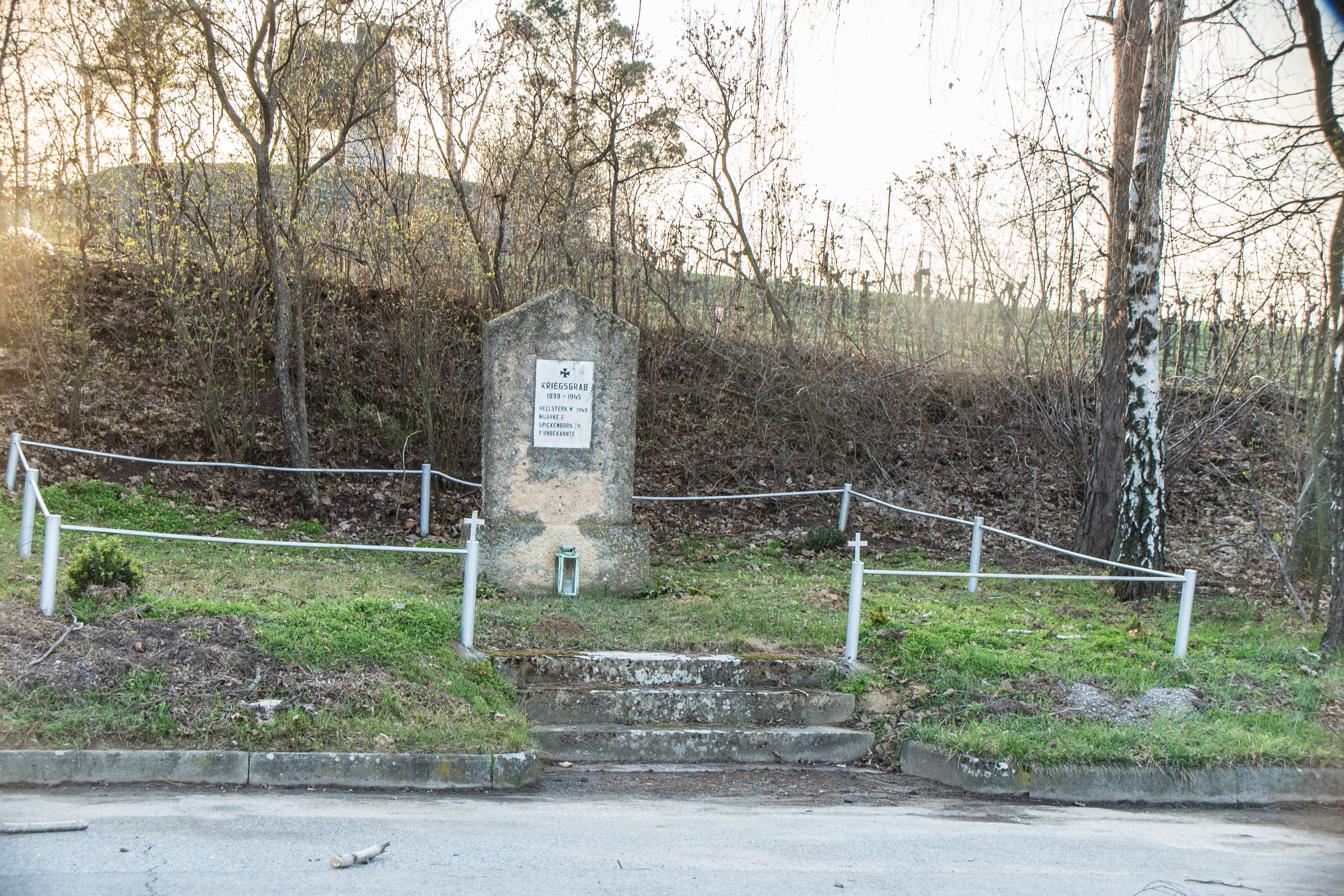 Walterskirchen, Kriegsgrab in Neugebäude